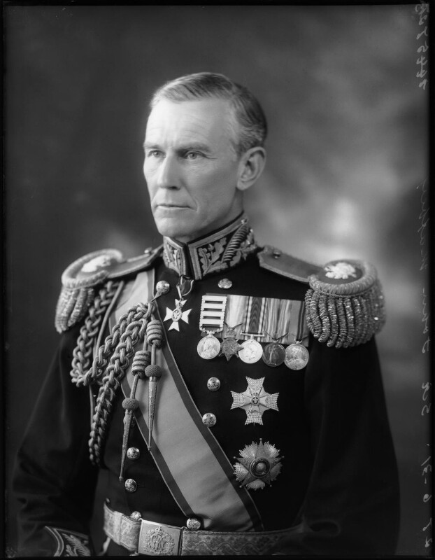 Lord Rugby